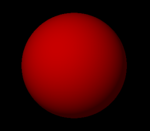 Bol - zelfgemaakt met Persistence of Vision Raytracer (POV-Ray)